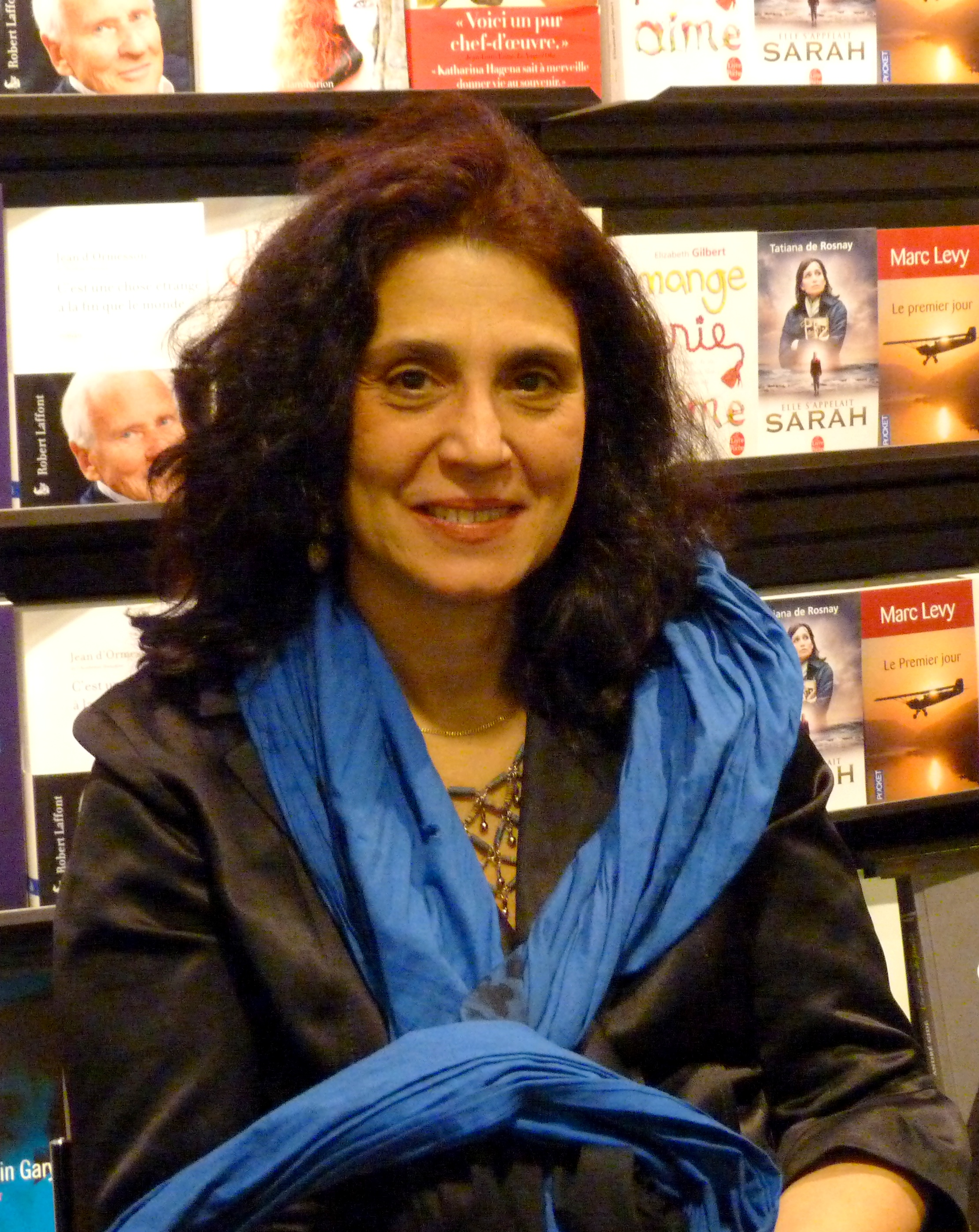 Chochana Boukhobza, lors d'une signature à la FNAC FOrum à Paris, pour son livre "Le Troisième jour", le 26 novembre 2010.